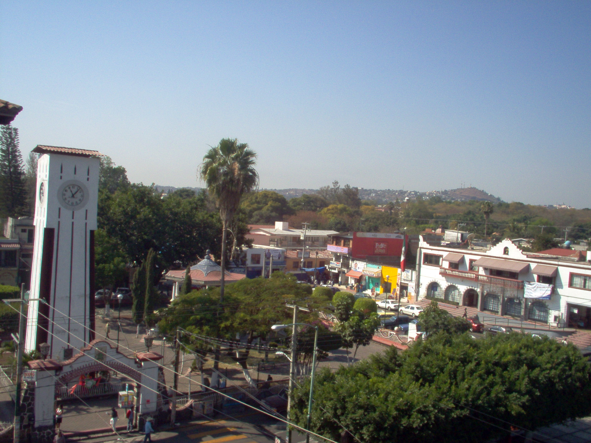 Imagen del zocalo de Jiutepec tomada desde el edificio mas alto contiguo, se observa el reloj central y la presidencia municipal.